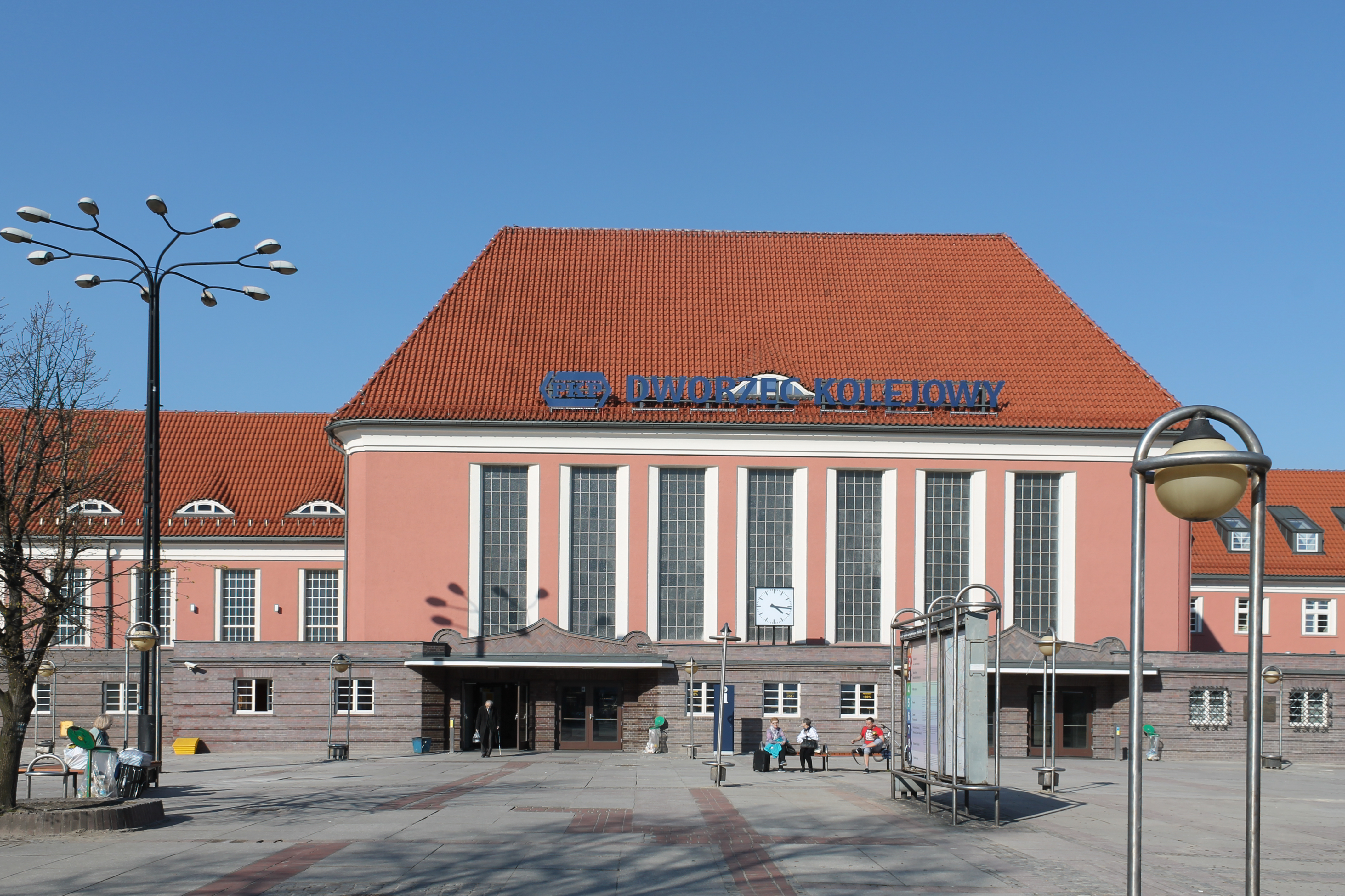 Dworzec kolejowy w Gliwicach po remoncie